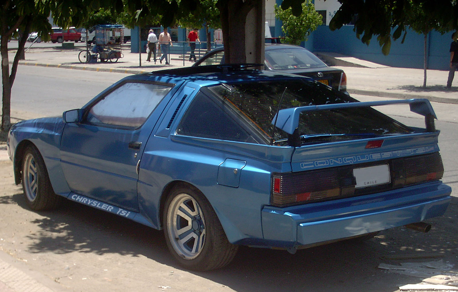 Chrysler Conquest 2.6 TSi 1988